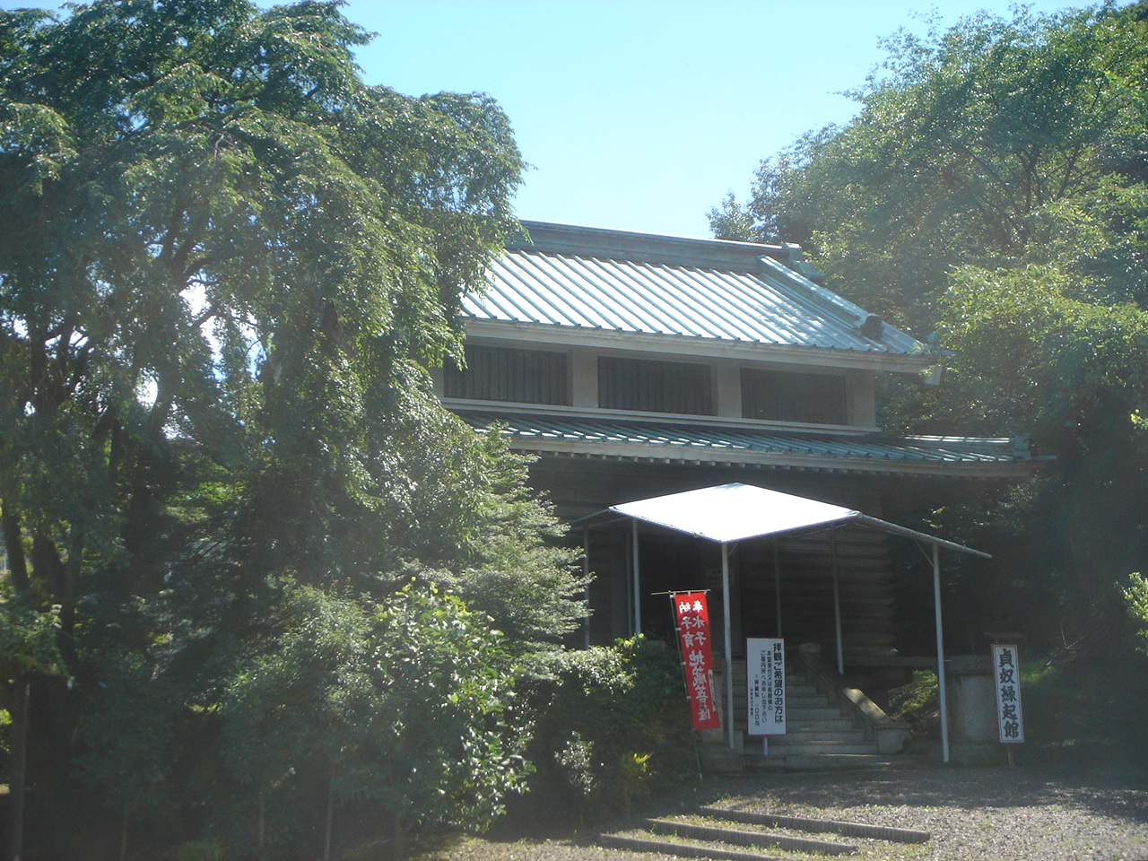 Teishoji(貞照寺にある貞奴縁起館),Kakamigahara,Gifu,Japan(岐阜県各務原市)で撮影。